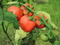 tomak (tomacco)